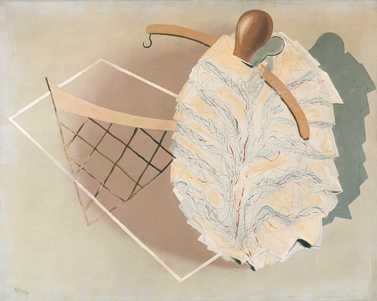 Adolf Hoffmeister, Sen v horečce, 1931-32